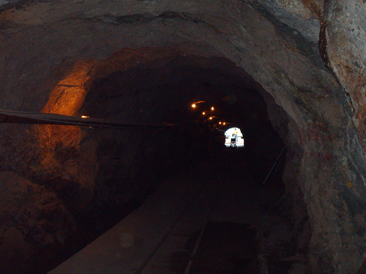 Interior de una mina en la ciudad de Guanajuato, México